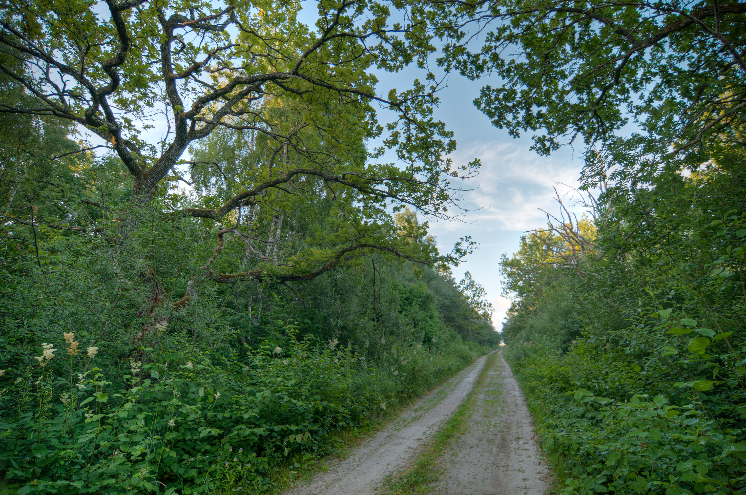 Jalutusrada läbi Loode tammiku mere äärde